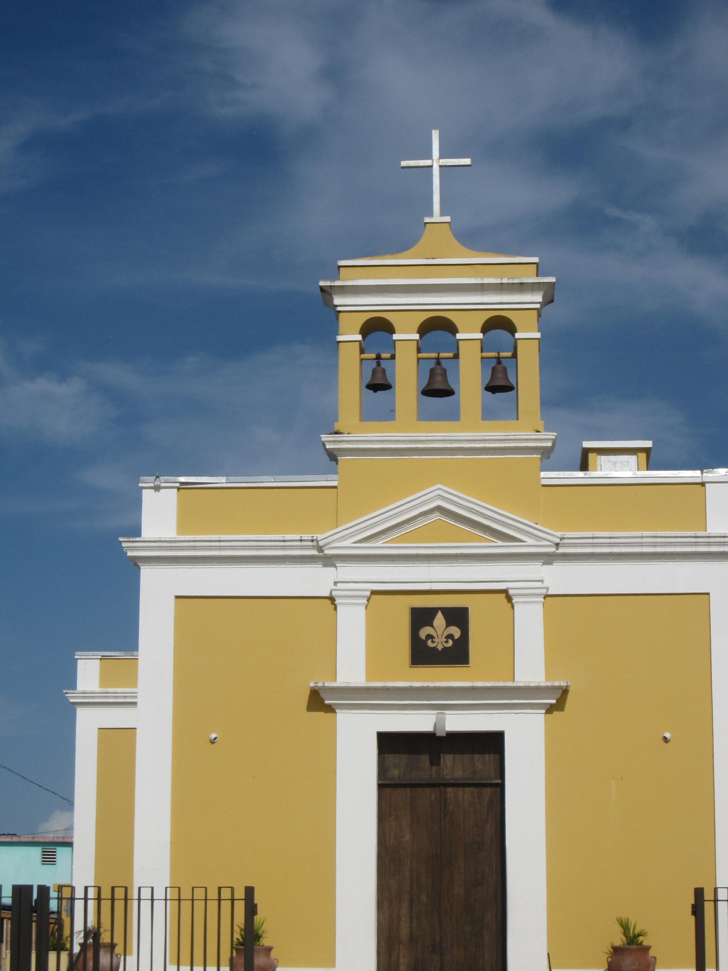 Parroquia San Antonio de Padua de Dorado